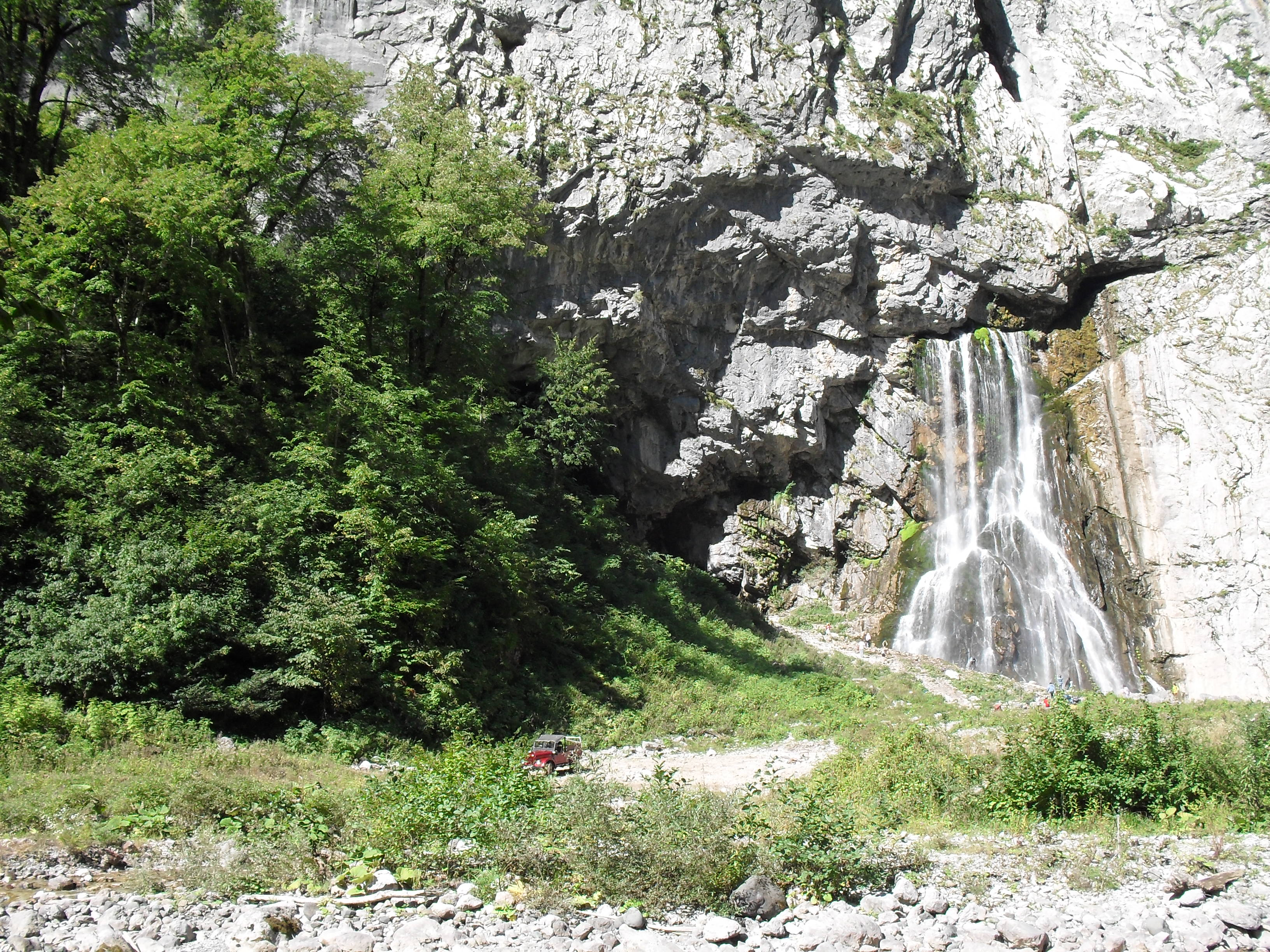 Абхазия. Гегский водопад у входа в пещеру Черкесский водопад